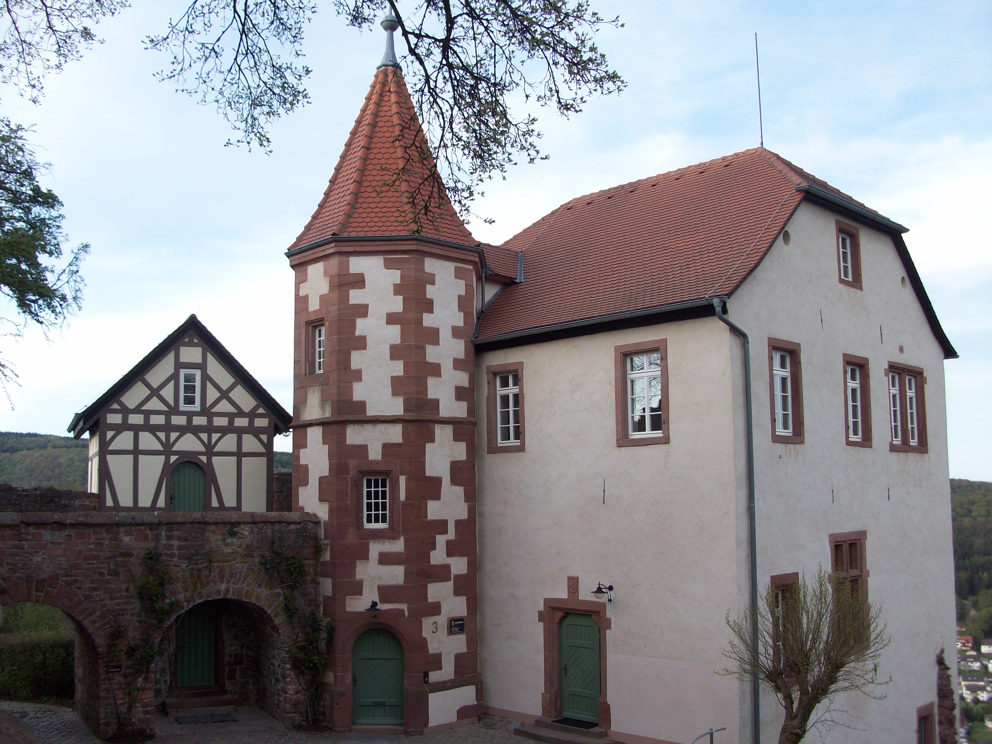 Das Komandantenhaus der Bergfeste Dilsberg (Burgmannenhaus)